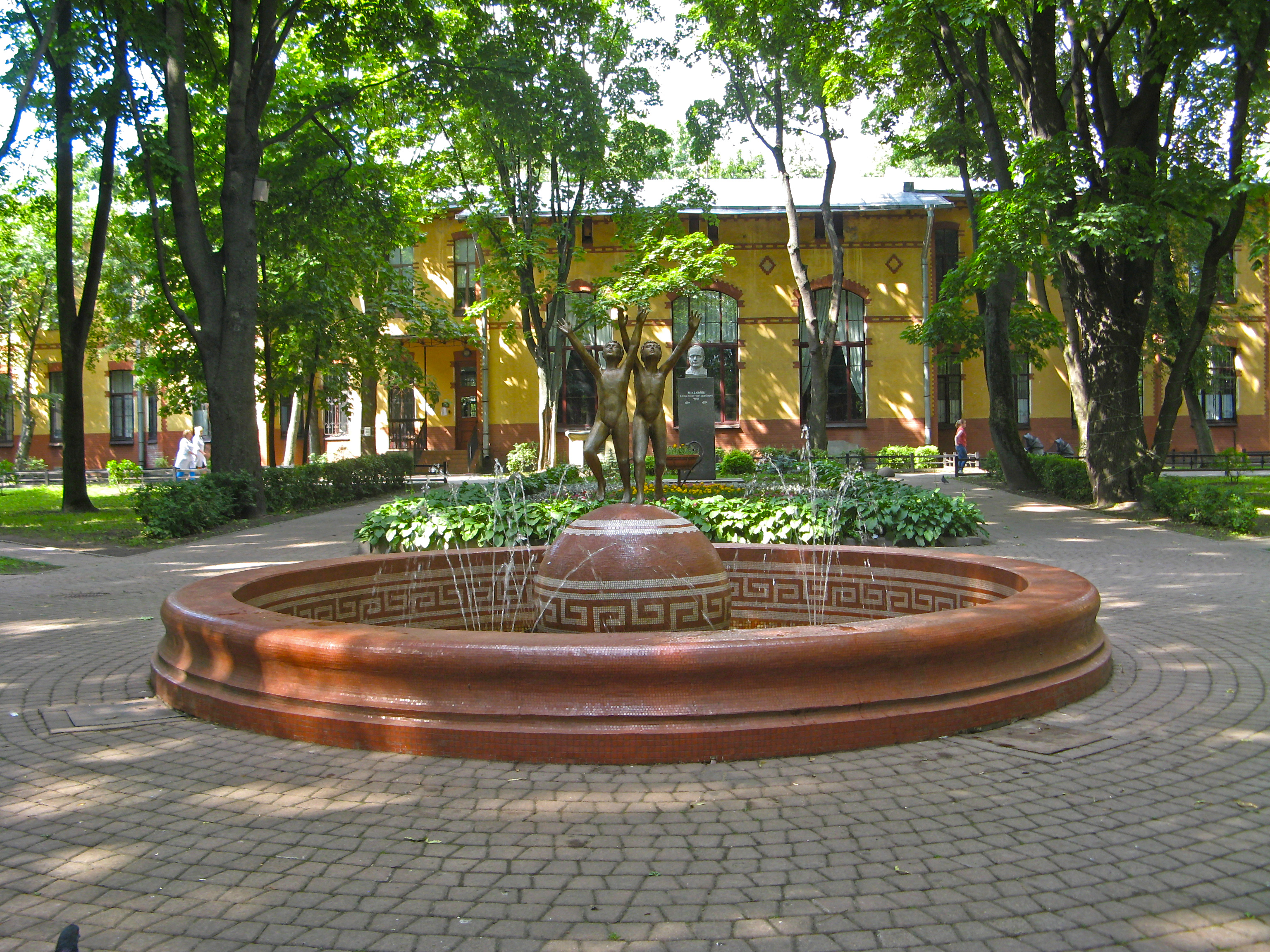 Детская больница в память Священного коронования Их Императорских Величеств. Сад: Литовская улица, 2, перед главным корпусом, Выборгский район, Санкт-Петербург